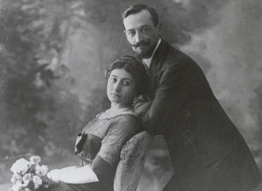 O casal Lucia Bonotti e Romolo Carbone